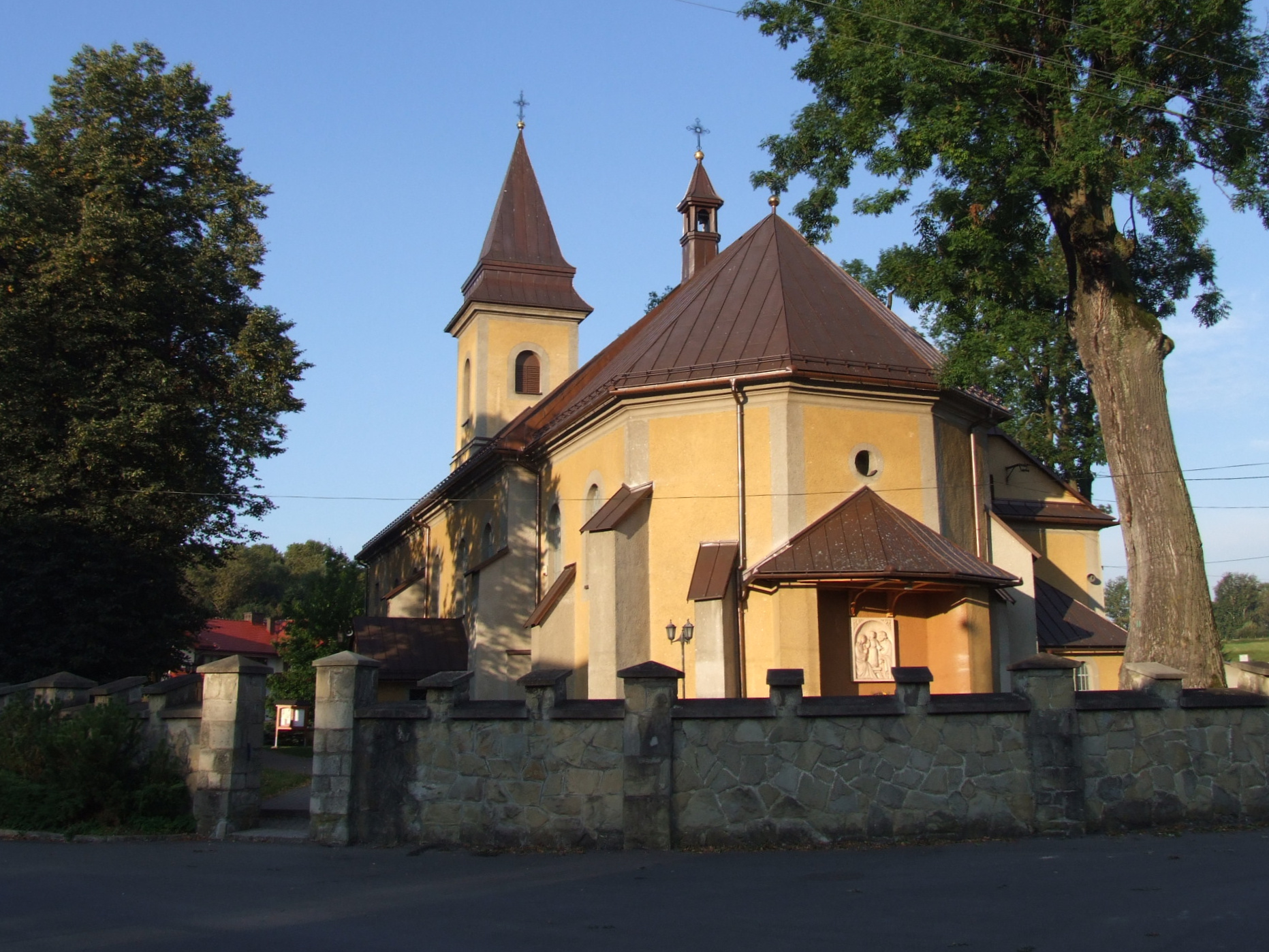 Raba Wyżna - kościół p.w. św. Stanisława (zabytek nr rejestr. A-989/M)